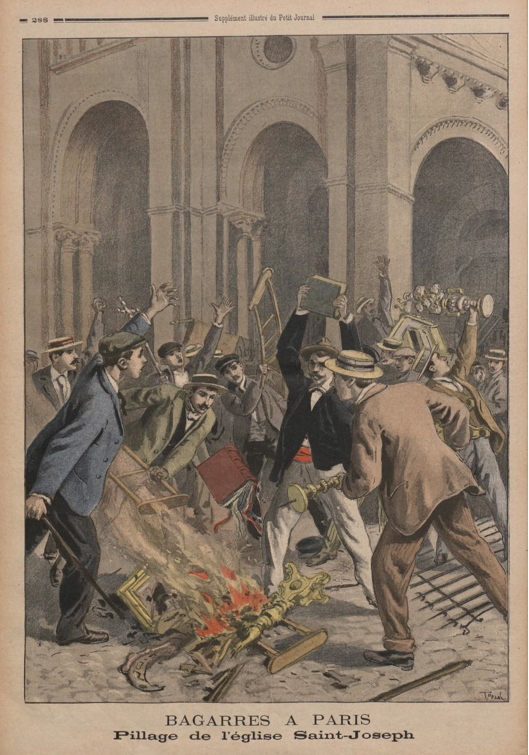 Le Petit Journal Illustré, 03/09/1899